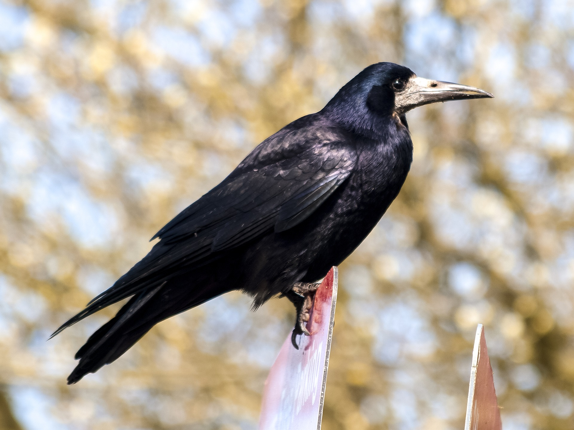 kovas